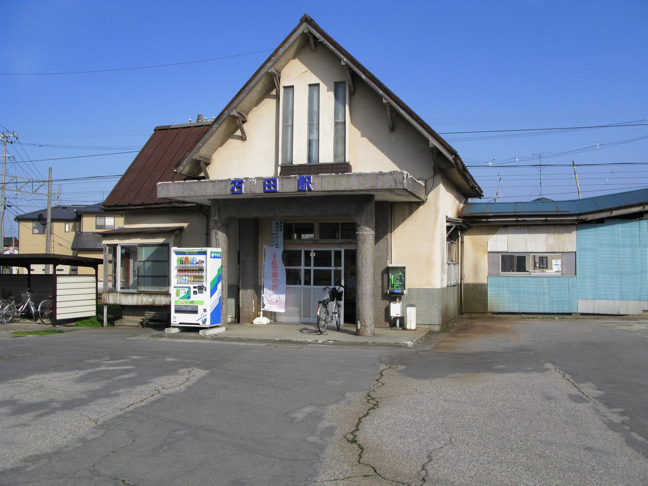 電鉄石田駅駅舎